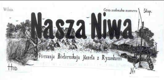 Наша Ніва (Nasza Niwa)